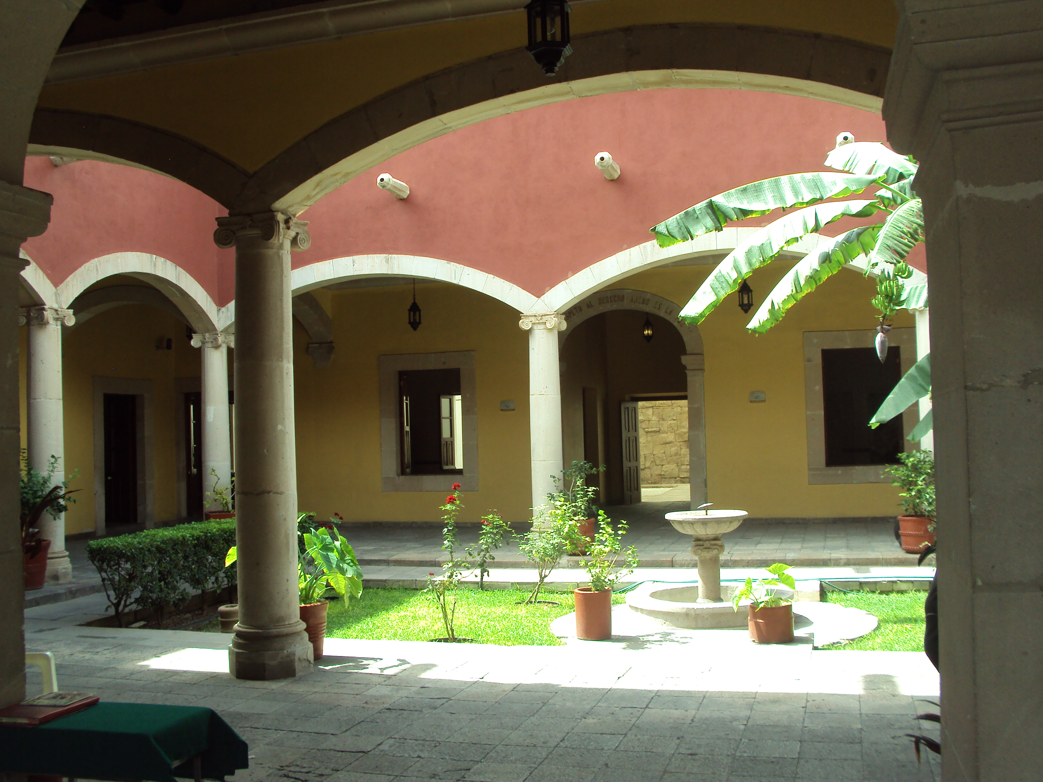 Jardín interior de la Casa de Juárez, hoy Museo de la Lealtad Republicana en Chihuahua, Chihuahua